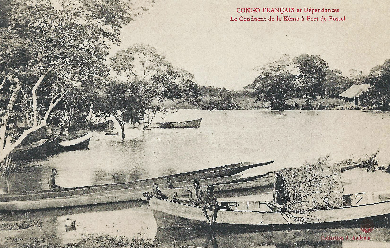 Le confluent de la Kémo à Fort de Possel. Collection J. Audema. Phot. A.B. & Cie, Nancy [Albert Bergeret] Congo Français et dépendances